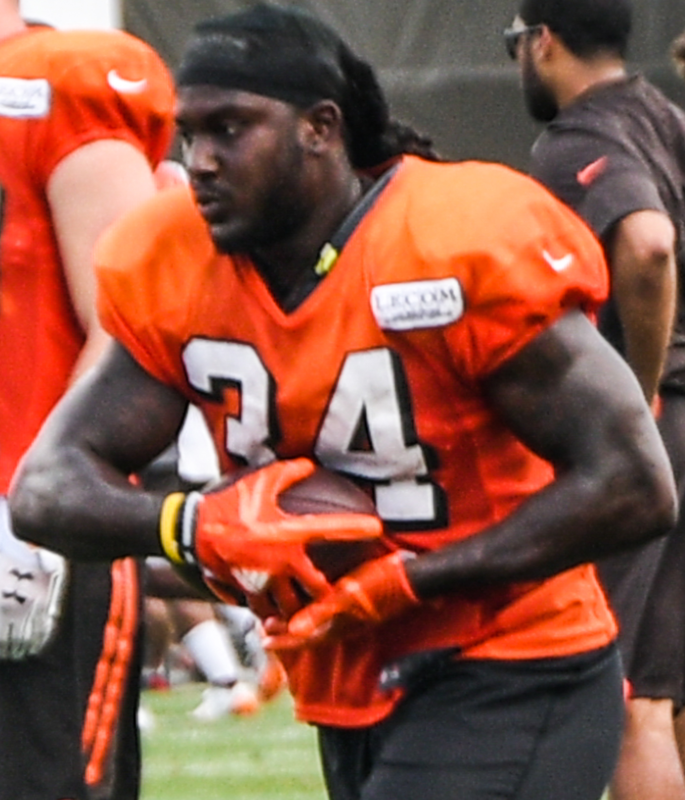 Isaiah Crowell